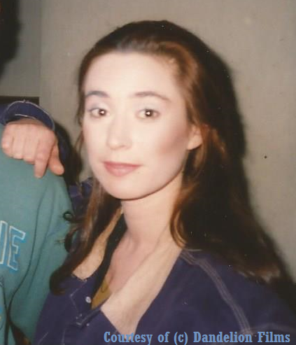 Manouk van der Meulen